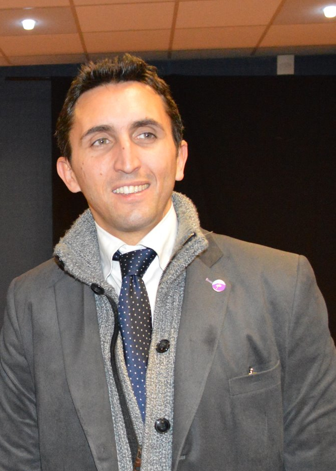 Portrait de Julien Aubert